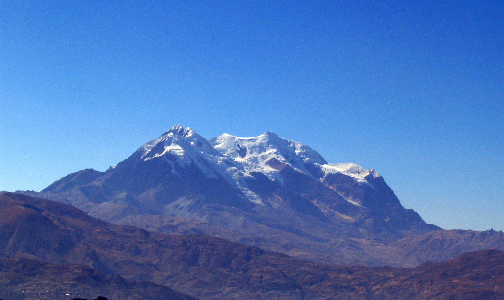 Photo prise par moi (user:Anakin) en Bolivie durant le mois d'août 2005.